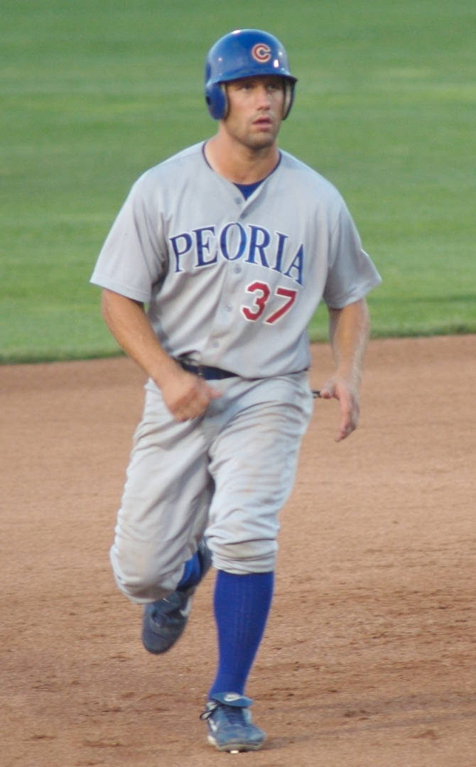 Russ Canzler